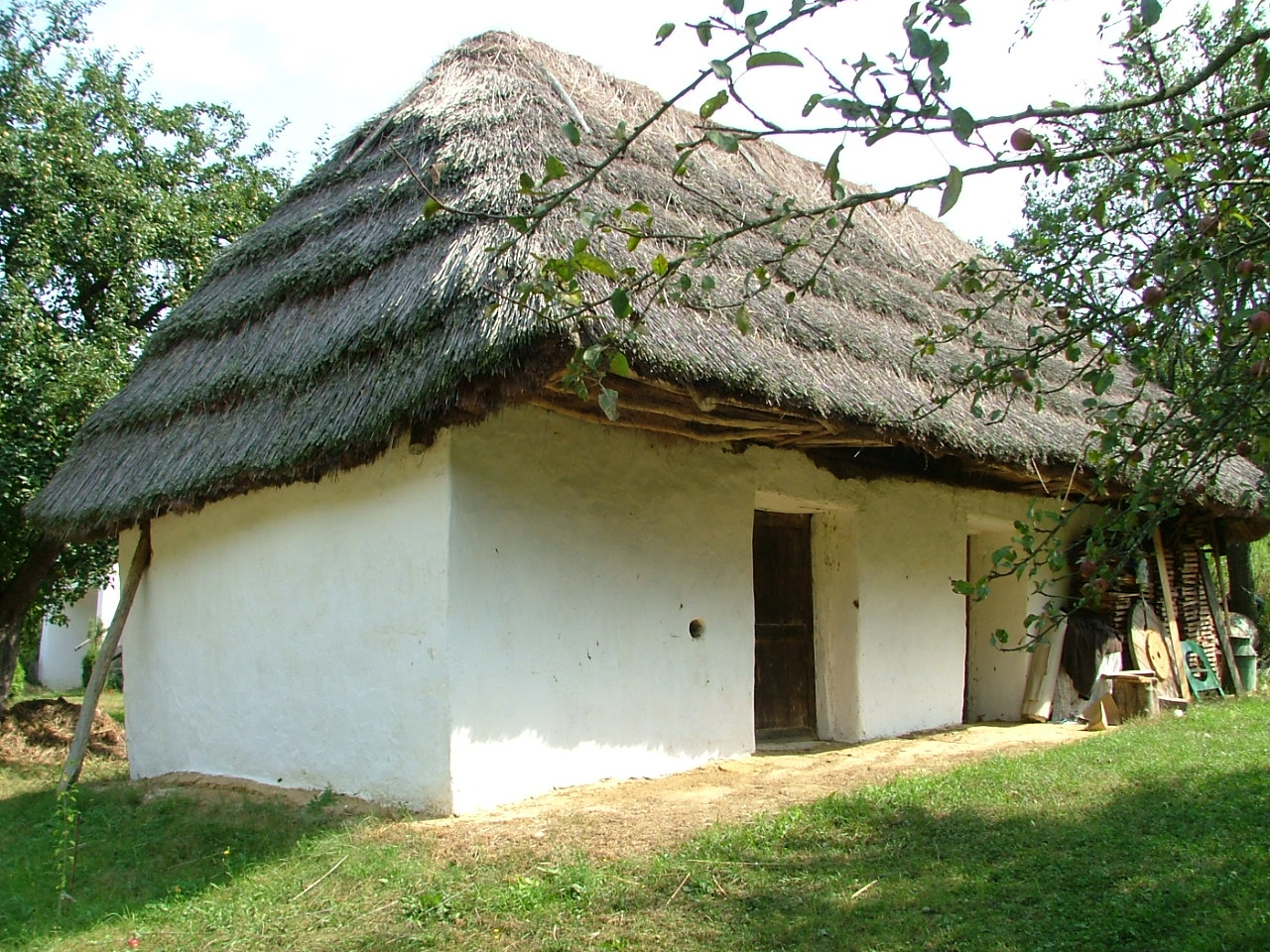 Preßhaus in Weinberg Oszko